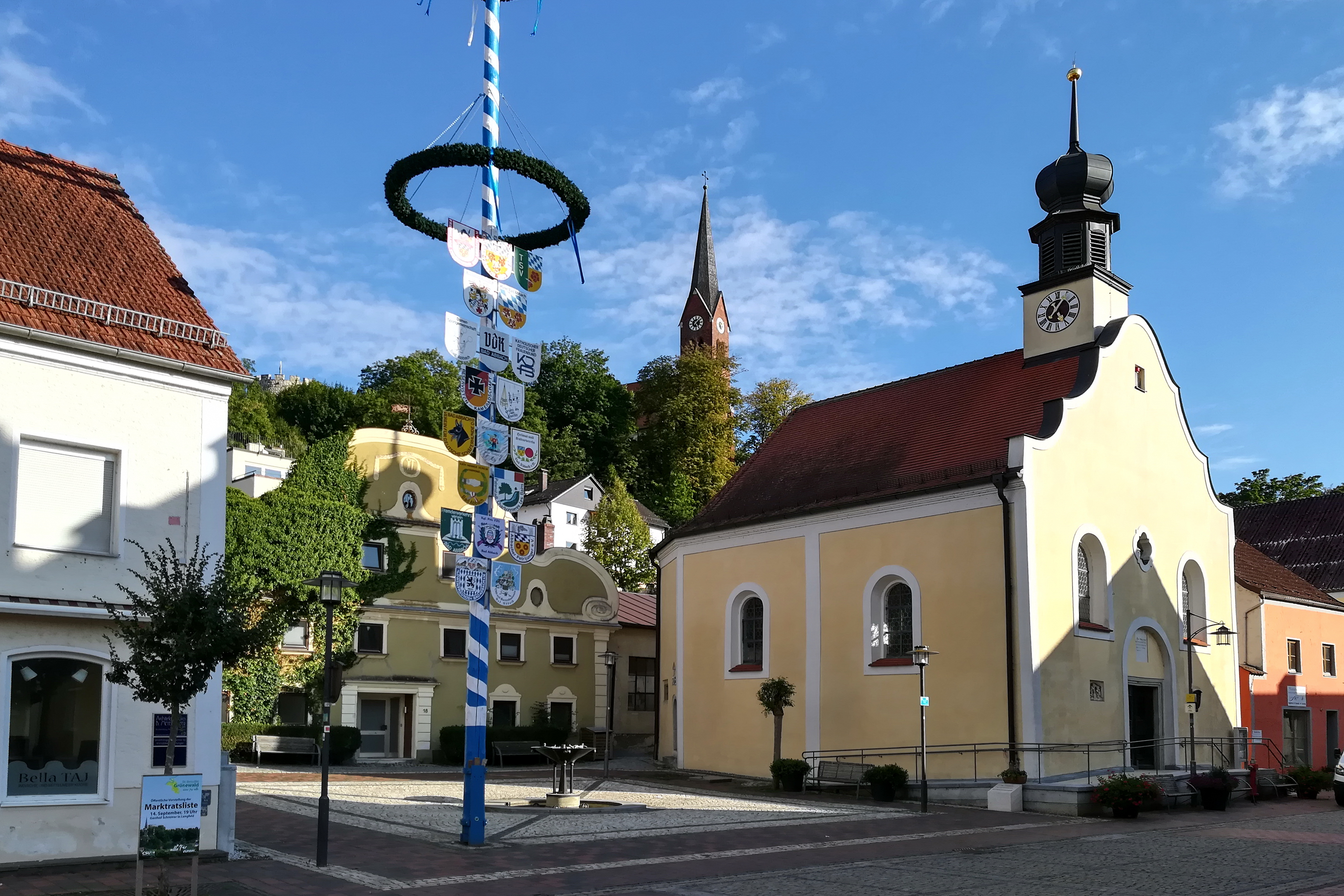 Zweijochiger Bau mit dreiseitigem Schluss, Schweifgiebel, mit Satteldach, 1470, barocker Ausbau 1784–86; mit Ausstattung.